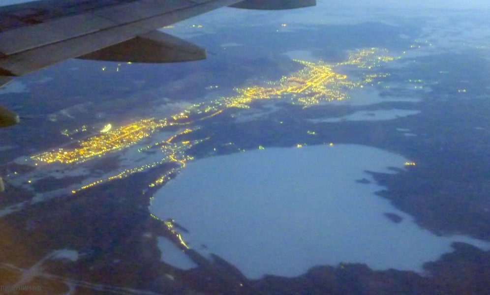 вид на город Миасс (Урал, Россия) из иллюминатора самолёта ночью